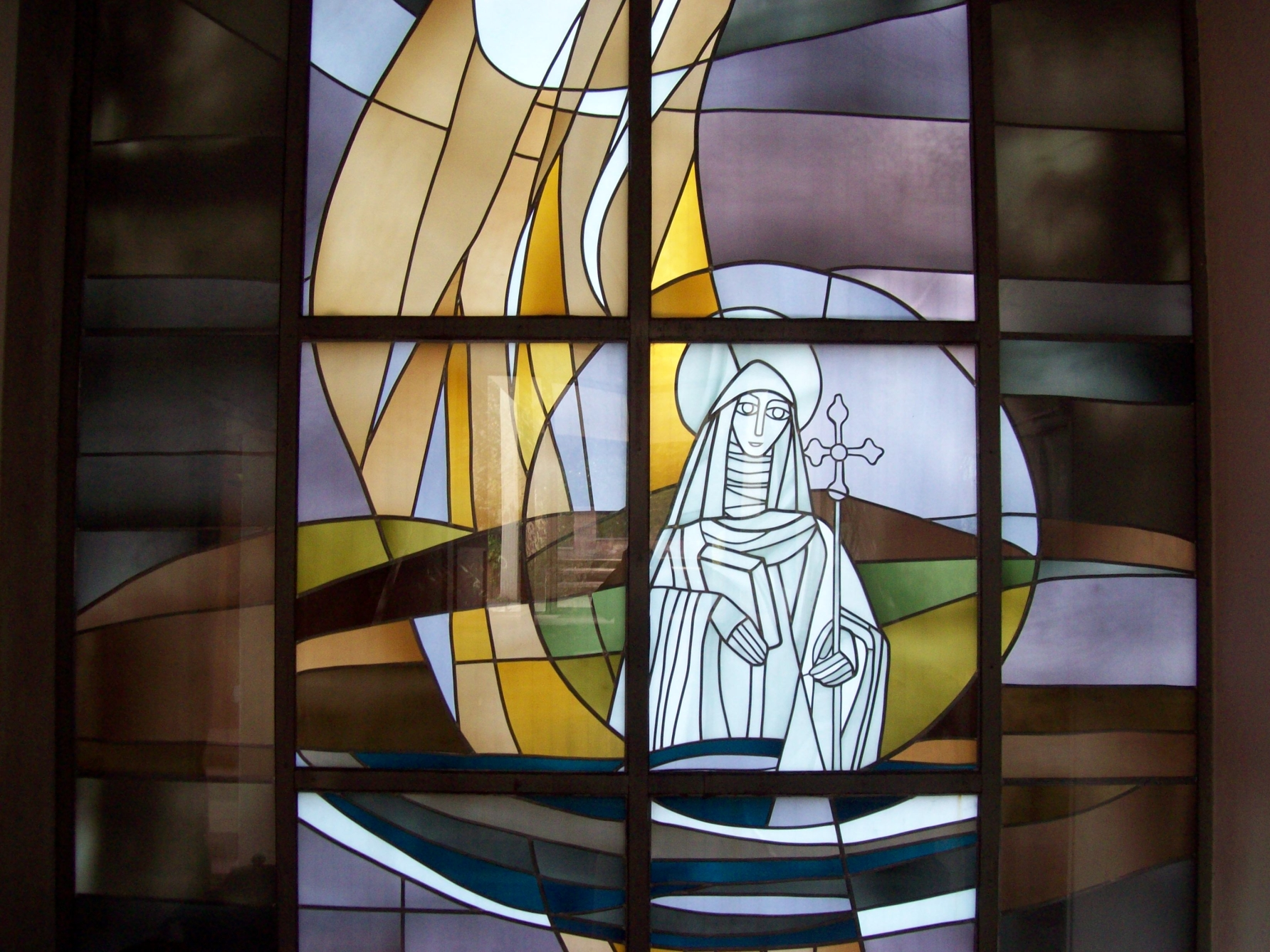 St. Gertrud Aschaffenburg Kirchenpatronin St. Gertrud Buntglasfenster